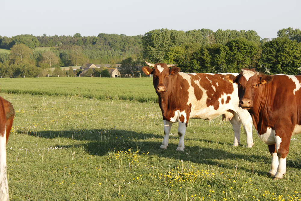 Maine-Anjou cows around Saint-Brice (Mayenne, France).